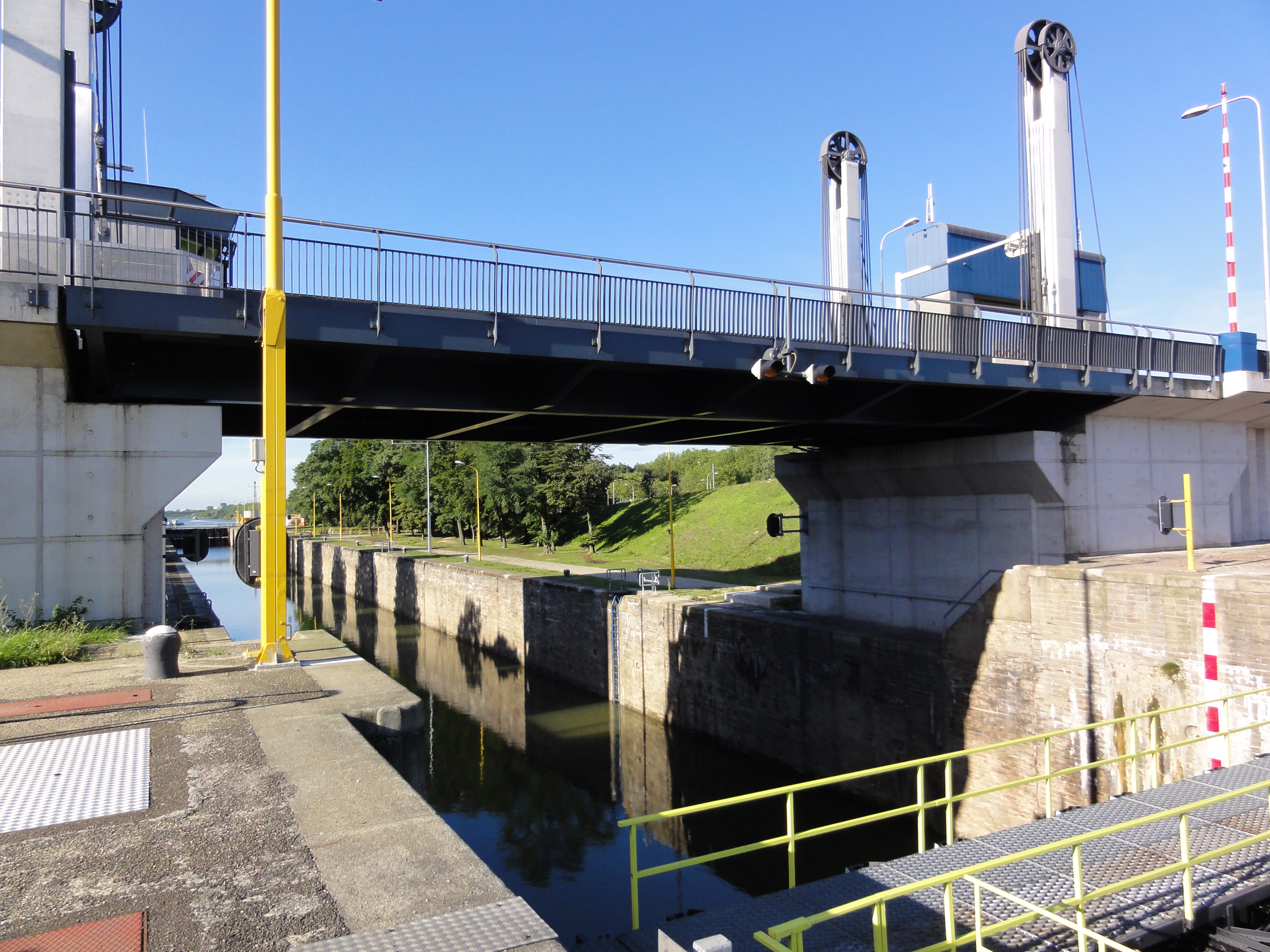 Nijmegen Rijksmonument 523034 Brug en sluis Weurt.